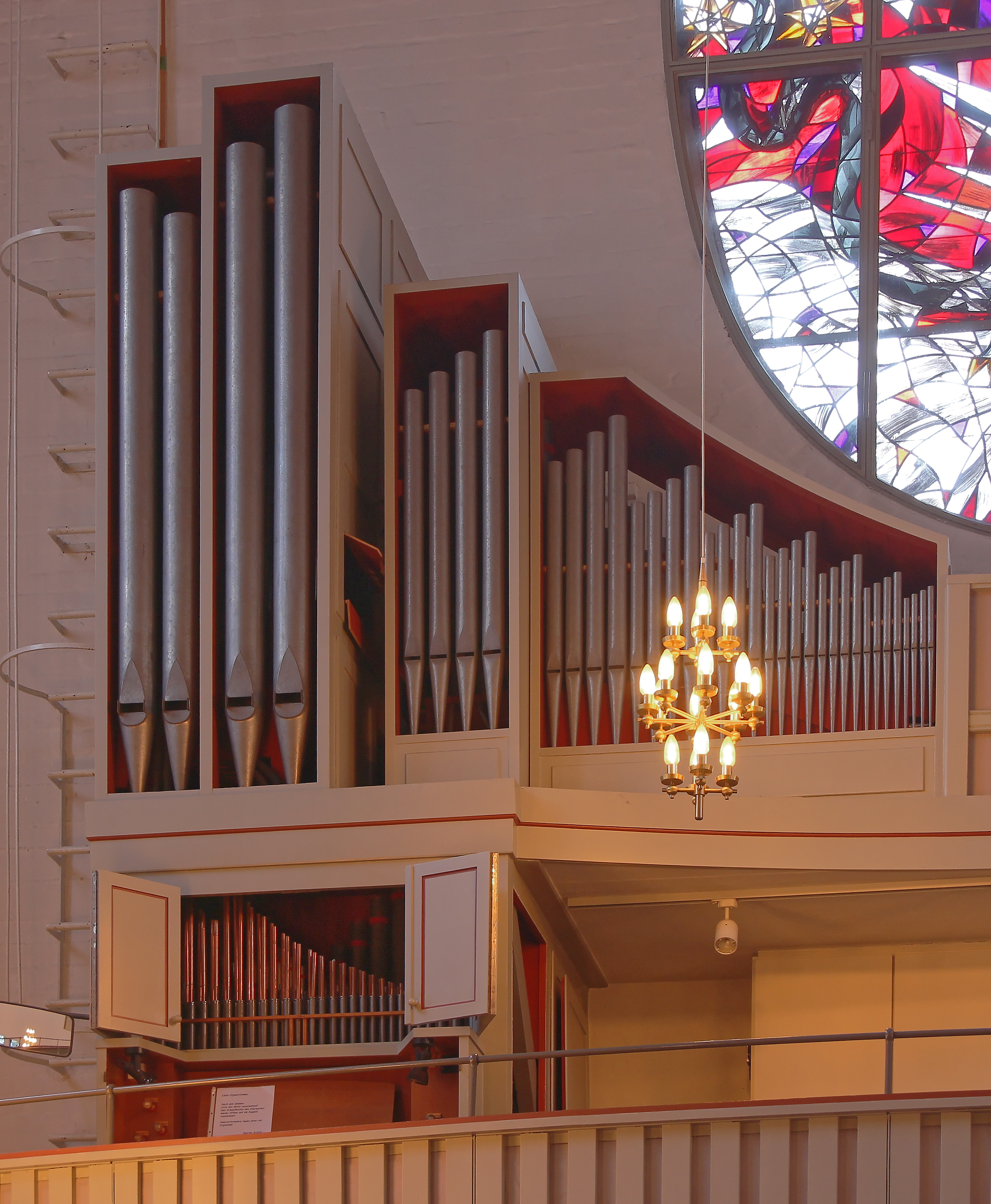 Kirche St. Michael, Hamburg-Bergedorf, Innenraum, Orgelprospekt